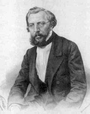 Ivan_Aksakov